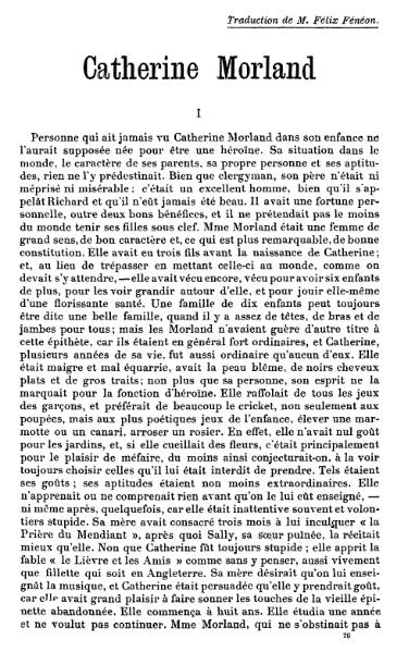 Incipit de la traduction de Northanger Abbey paru dans le numéro de mai 1898 de La Revue blanche.